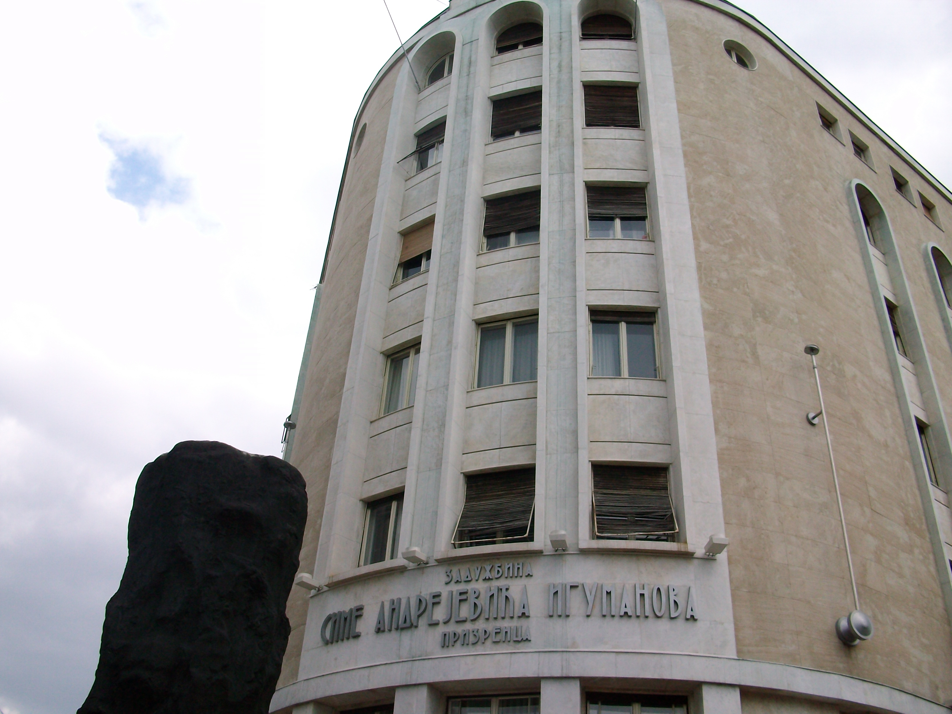 Игуманова палата / Iguman`s palace